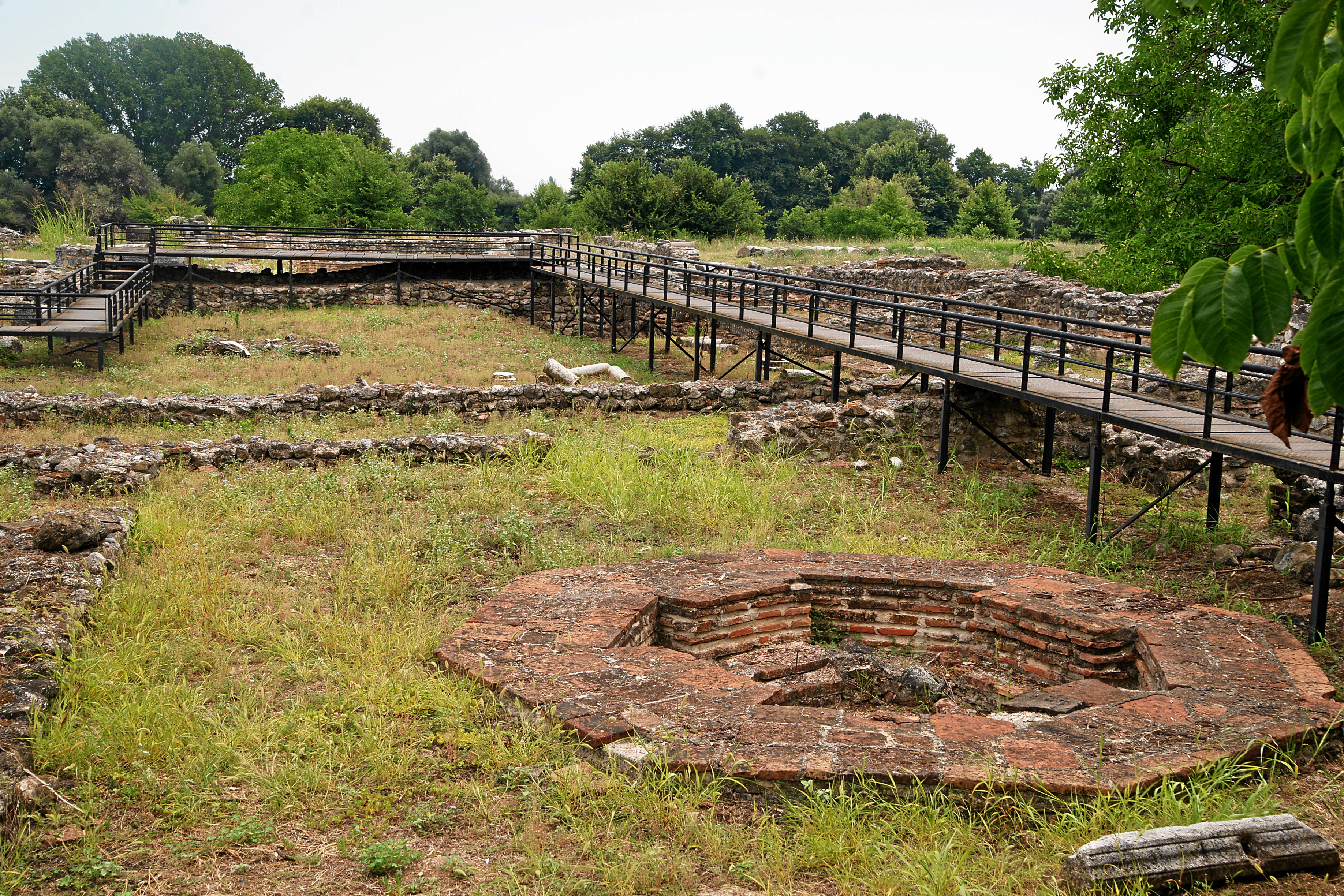 Archäolog. Park Dion: Baptisterium (Taufbecken) der Basilika